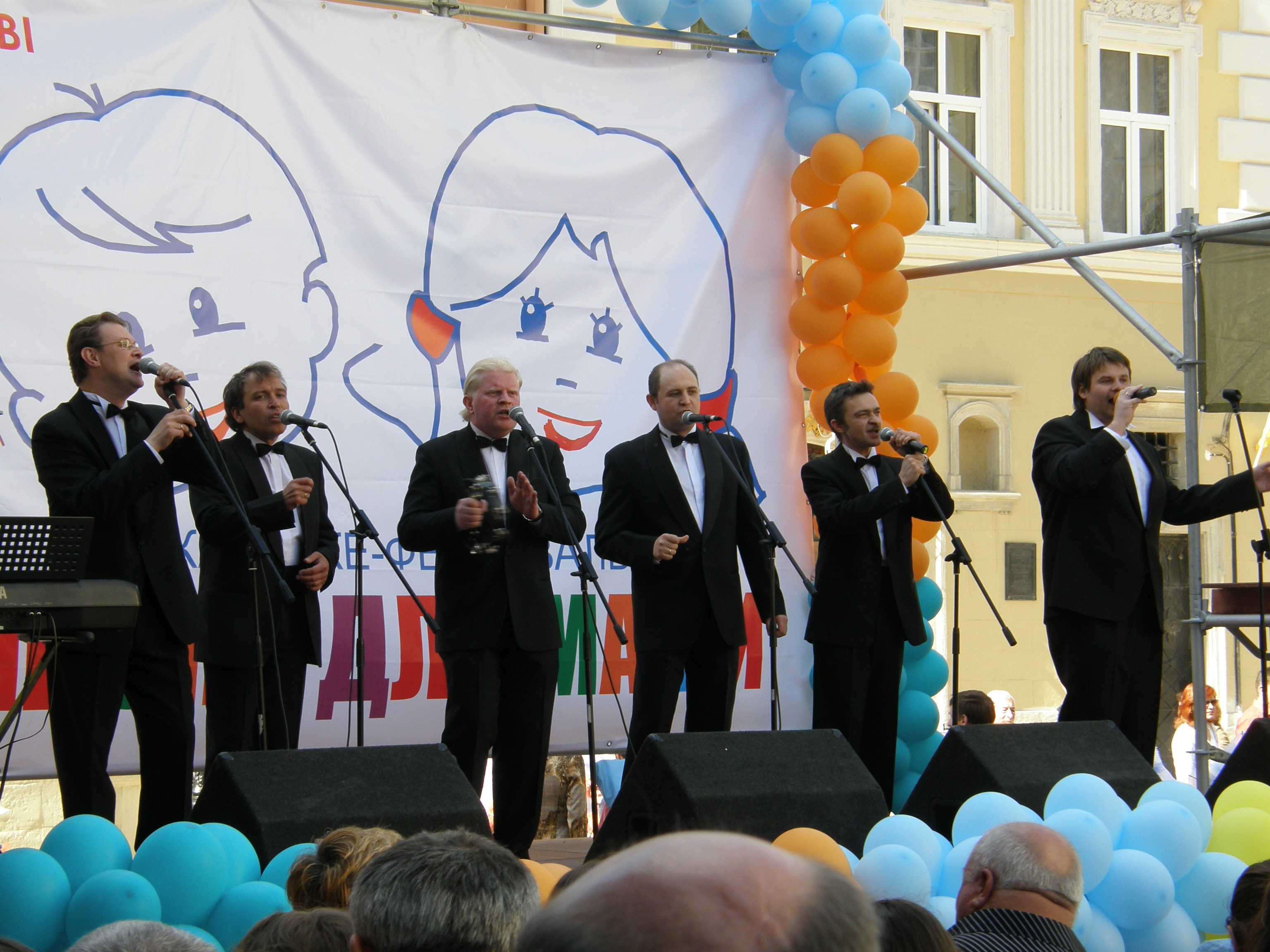 Pikkardiyska Tertsia in Lviv